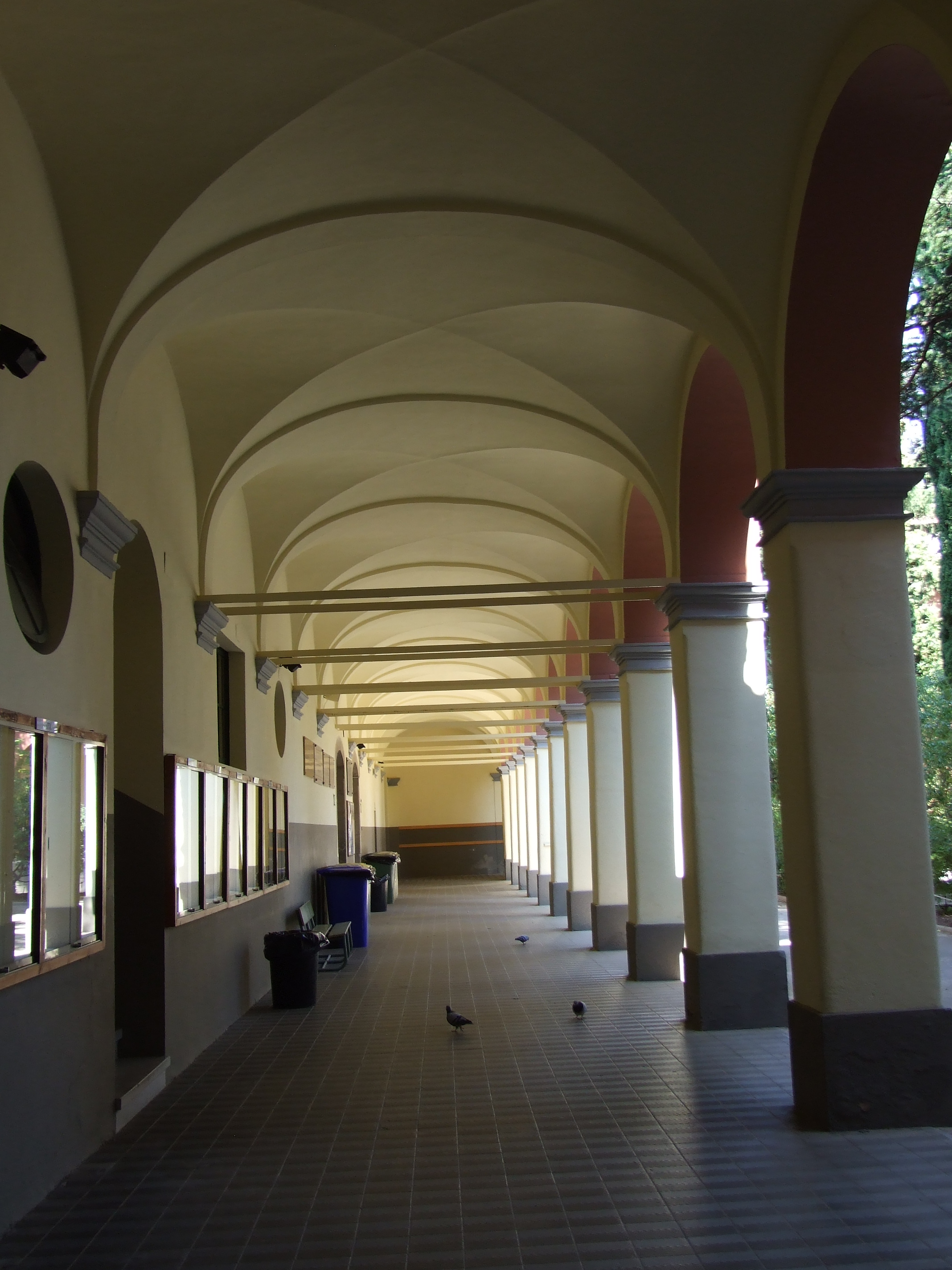 IES Ramon Muntaner, 2 d'octubre 2009